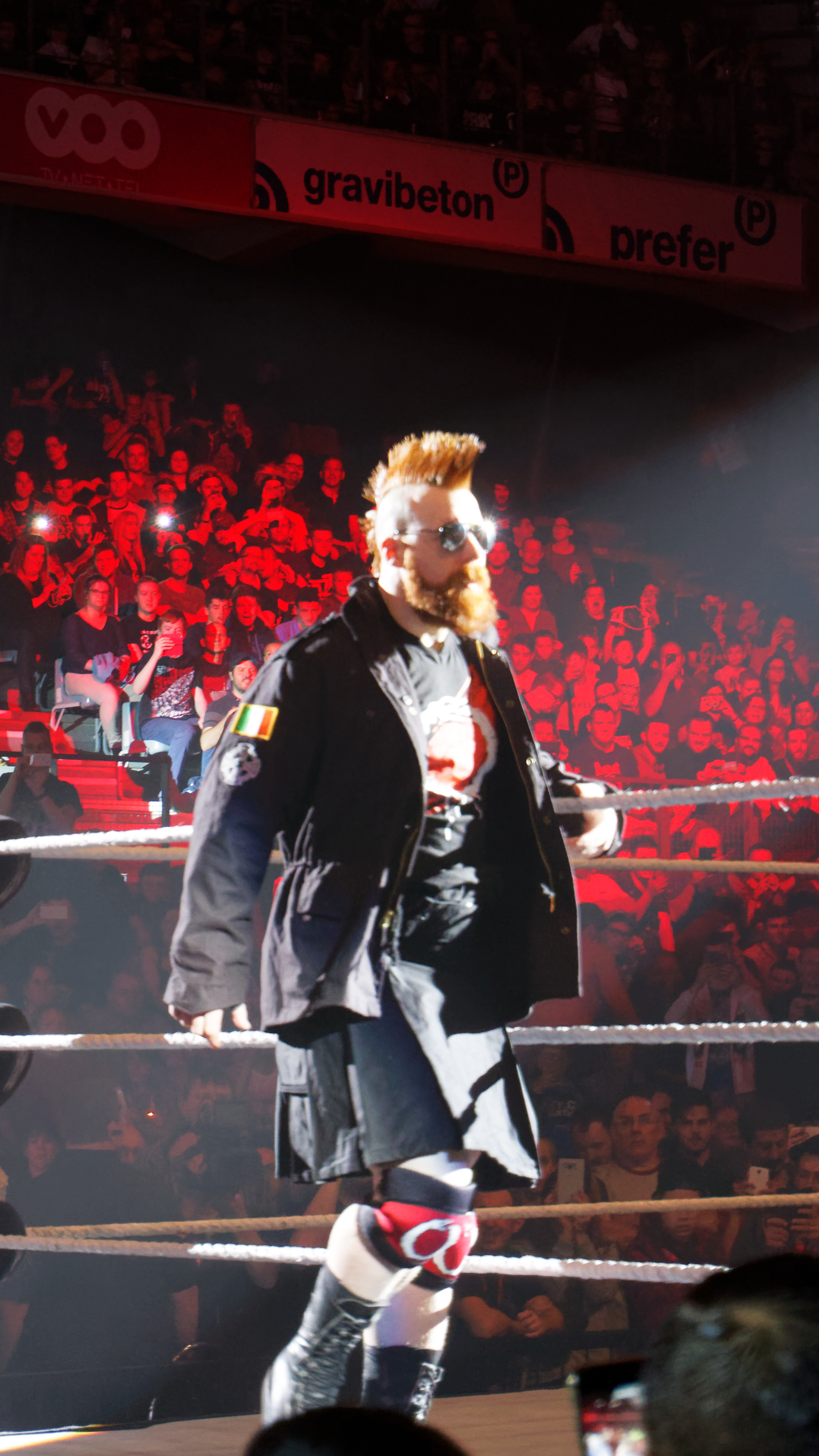 Jeff Hardy (c) & Matt Hardy (c) defeat Big Cass & Enzo Amore, Cesaro & Sheamus (in Triple Threat Match) Info on the match : WWE RAW Tag Team Title ( Le vendredi 12 mai, la WWE Live Tour fera escale au Country Hall a Liege pour le spectacle de catch de l'annee! Au programme: des duels impitoyables et des rencontres captivantes entre les meilleures equipes et les plus grands rivaux. )